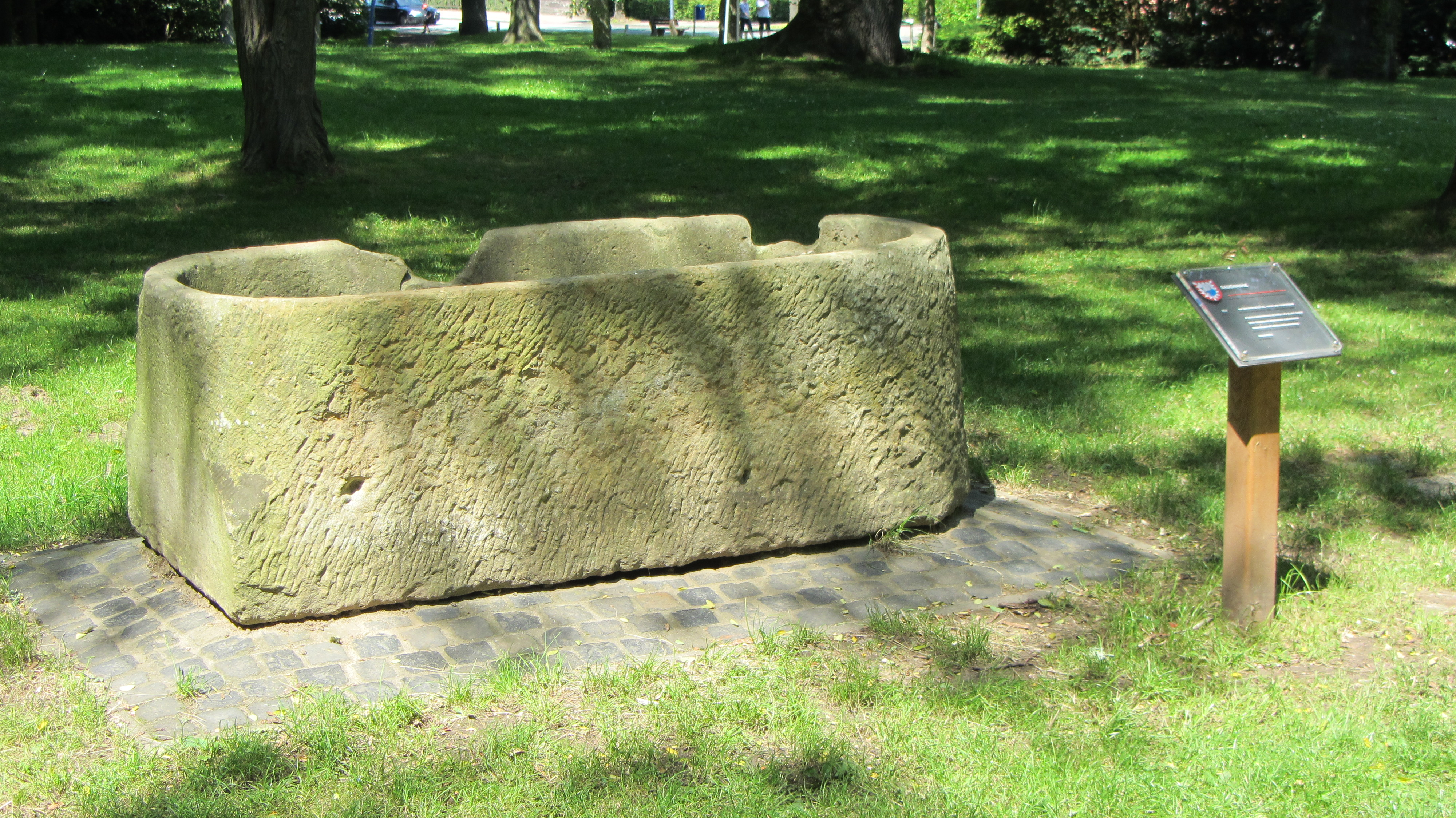 Badewanne aus 1813. Innenschrift der Tafel: "Badewanne 1813 Aus dem eröffneten Sol,- Moor und Schwefelbad Je sieben Badewannen befanden sich in zwei durch einen Säulengang miteinander verbundenen Badepavillion mit achteckigem Grundriss. Baudenkmal"